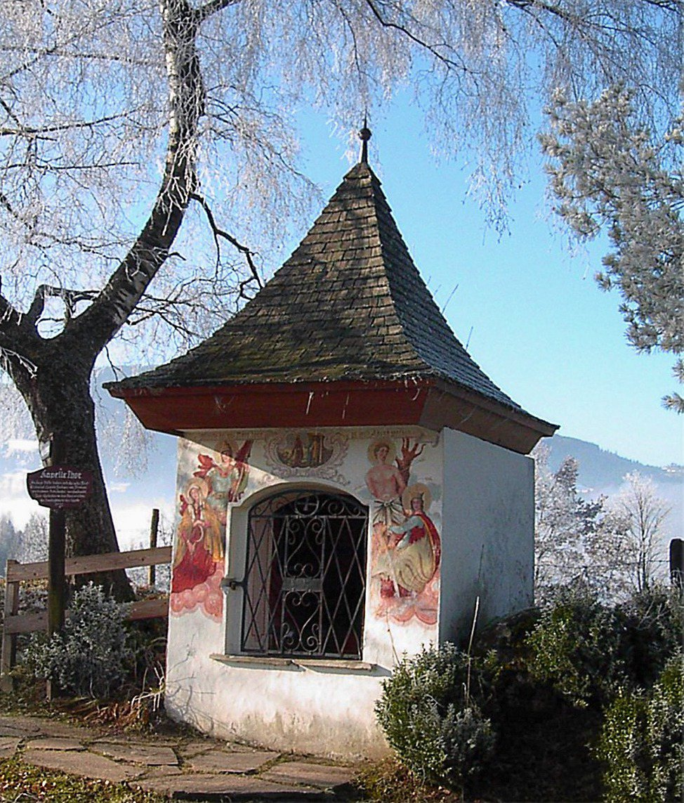 Saalfelden 2004